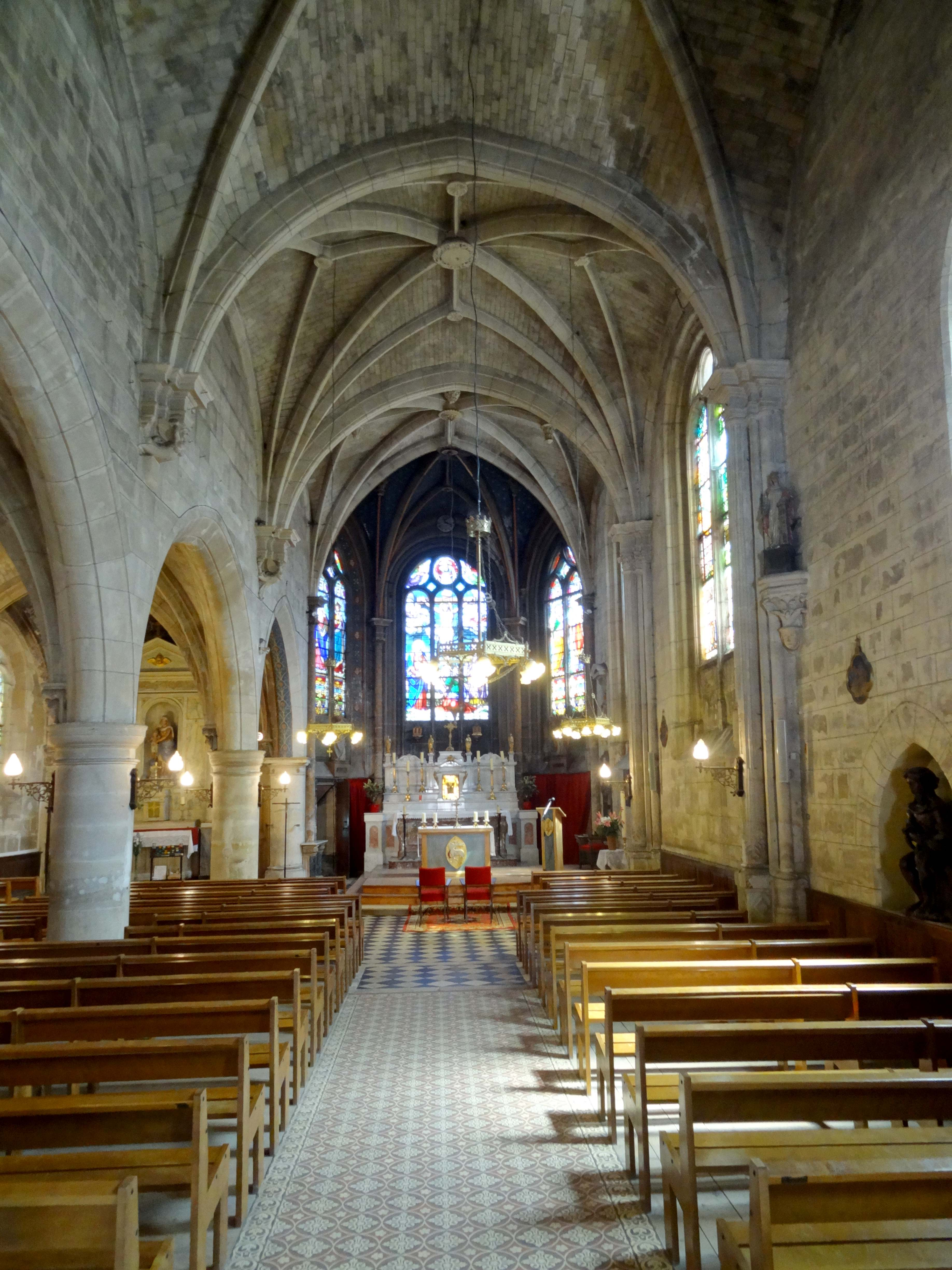 Intérieur de l'église - voir titre.